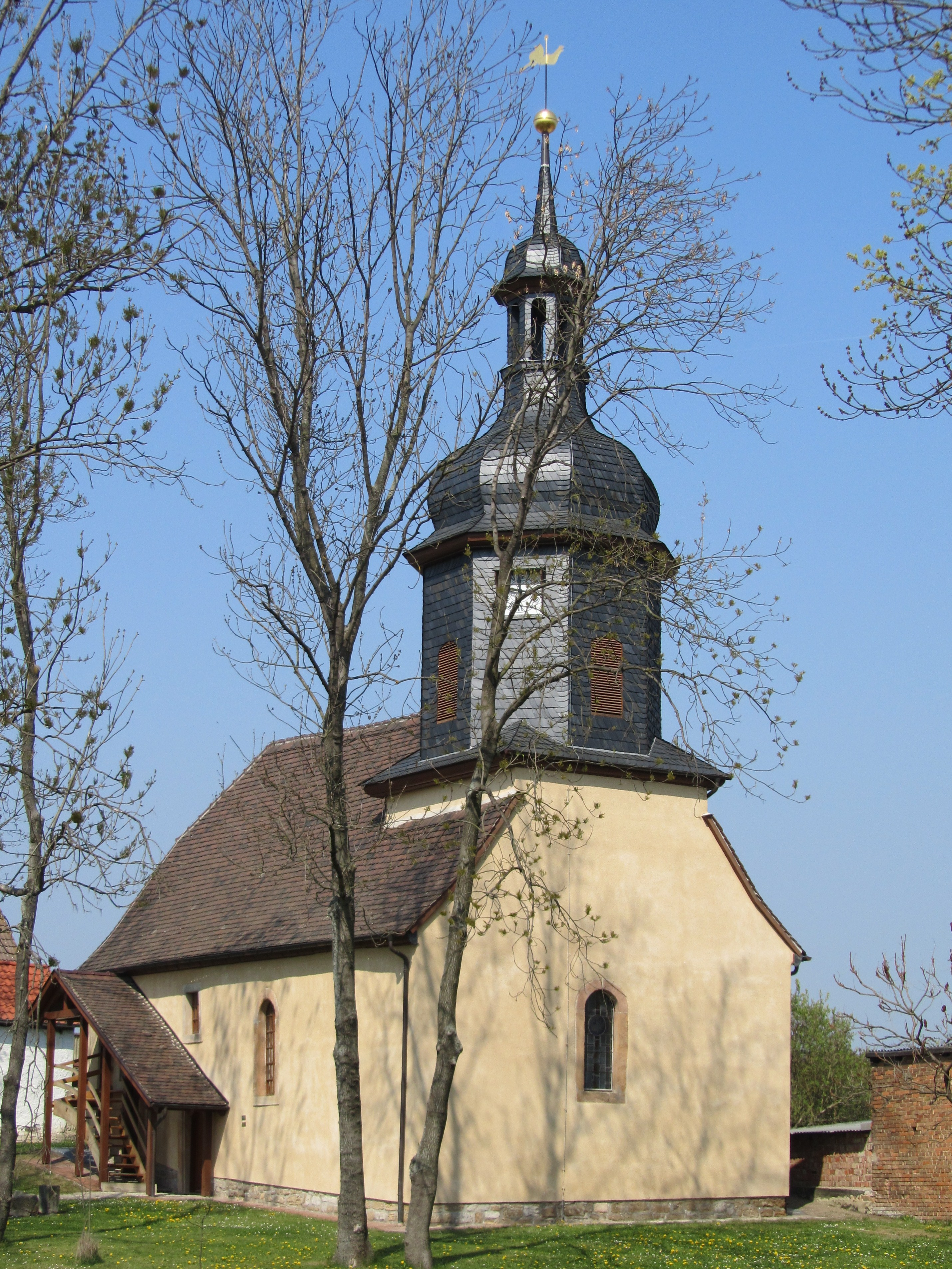 Die Kirche von Seena (Sachsen-Anhalt).